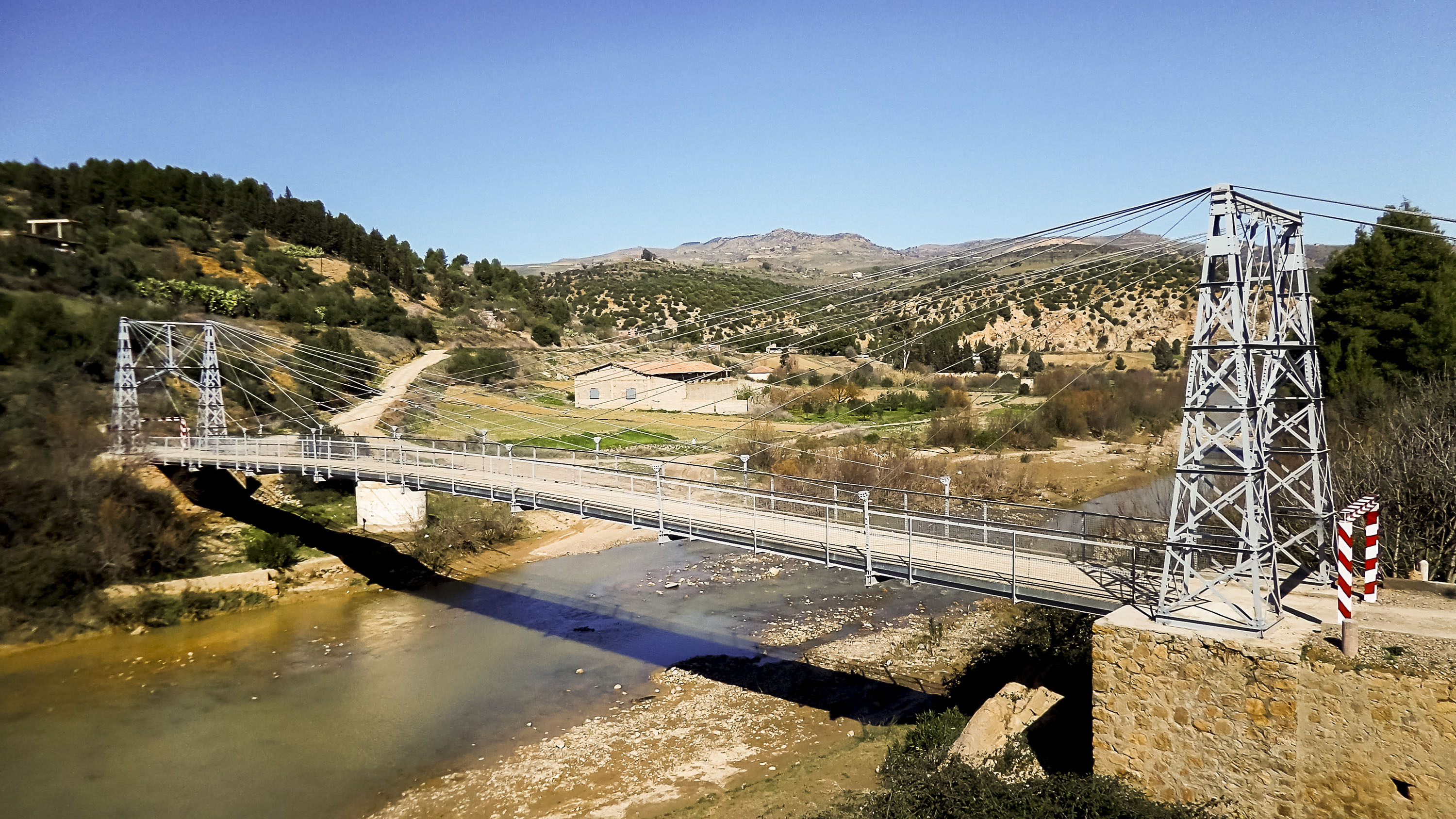 Pont suspendu de Tablat, Médéa الجسر المعلععلى واد يسر بتابلاط - المدية